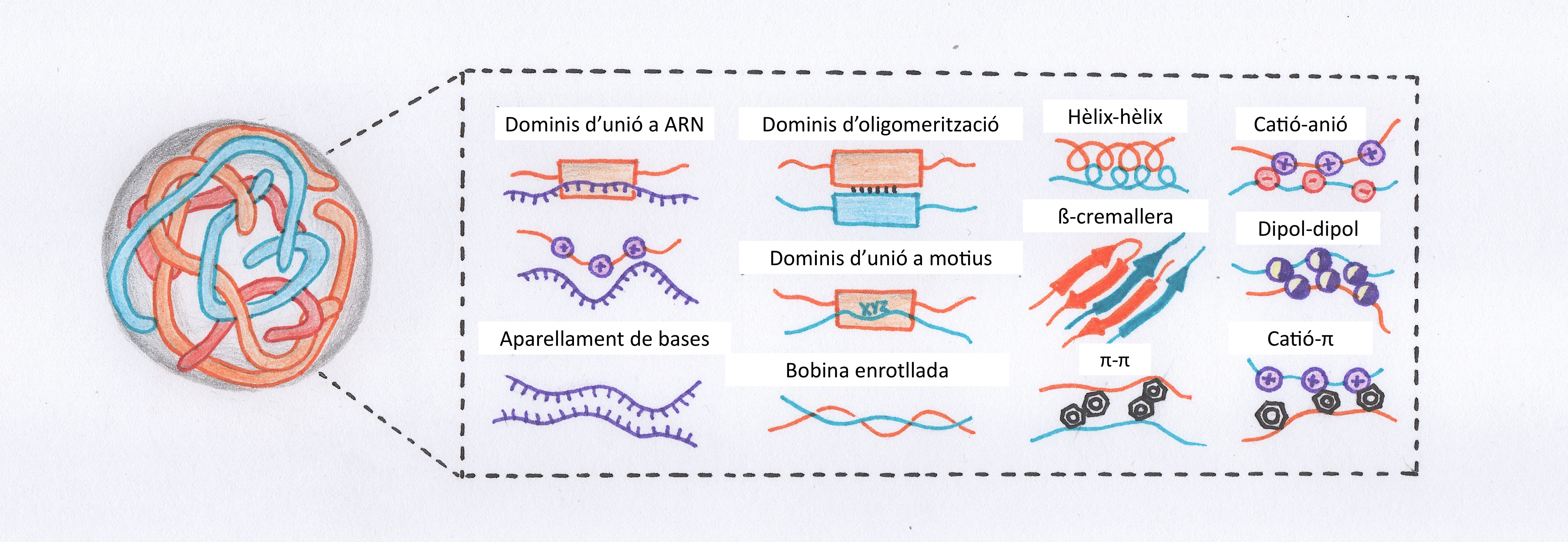 Les IDPs poden adoptar múltiples estructures i per tant també són diversos els possibles contactes que poden establir. Els aminoàcids amb càrrega i els grups aromàtics (amb orbitals π), així com la presència afegida d'ARN, afavoreixen especialment la separació de fase, però també poden haver-hi interaccions entre els dominis amb estructura secundària.